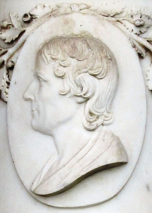 Helene Charlotte von Friedland (1754–1803), vom Bildhauer Heinrich Enrico Keller (1771–1832)